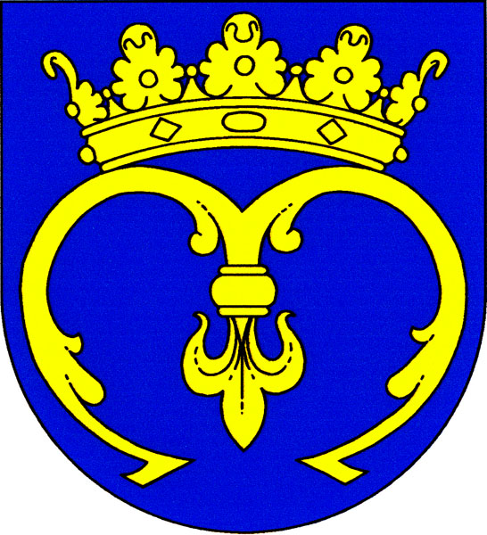 Znak obce Lodhéřov